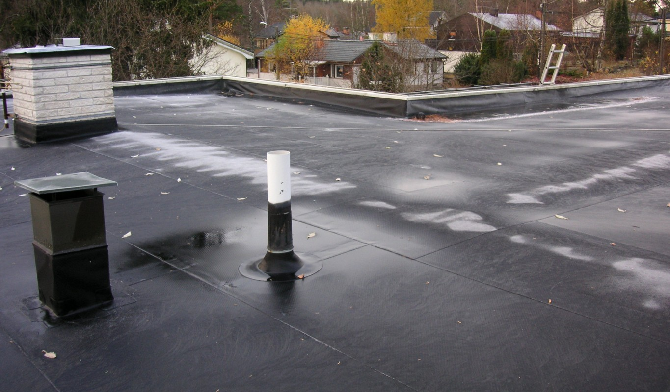 Plant tak